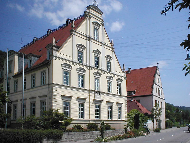 Rathaus und Weingut Borg Hornberg in Neckarzimmern